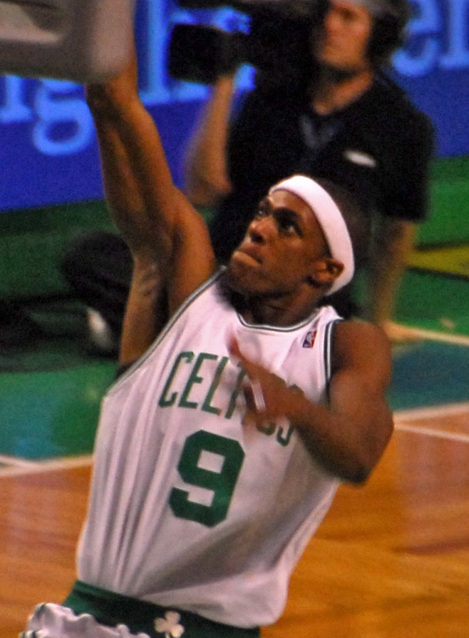 Rondo Dunks